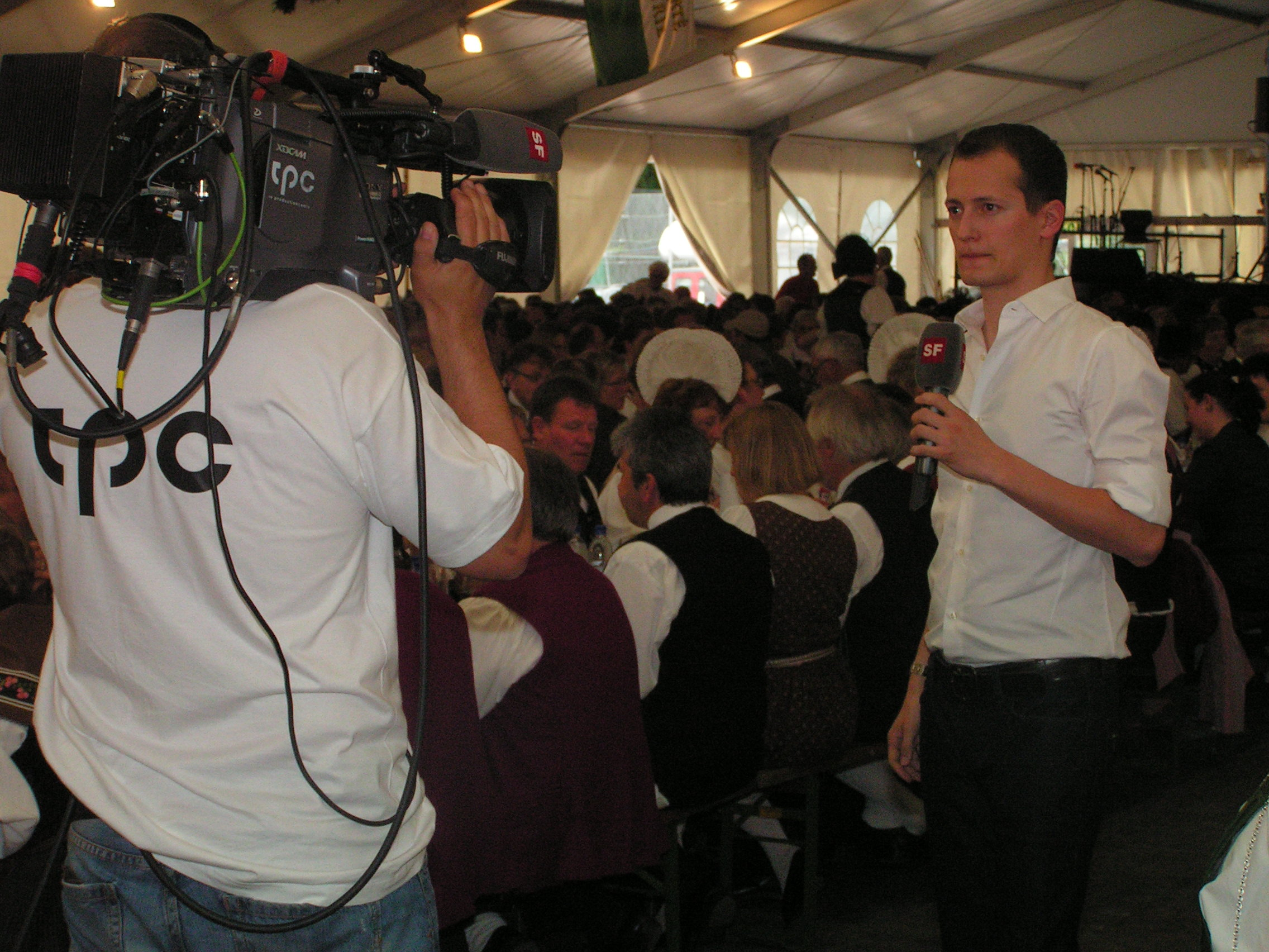 Liveberichterstattung in der TV-Sendung Schweiz aktuell, SF1